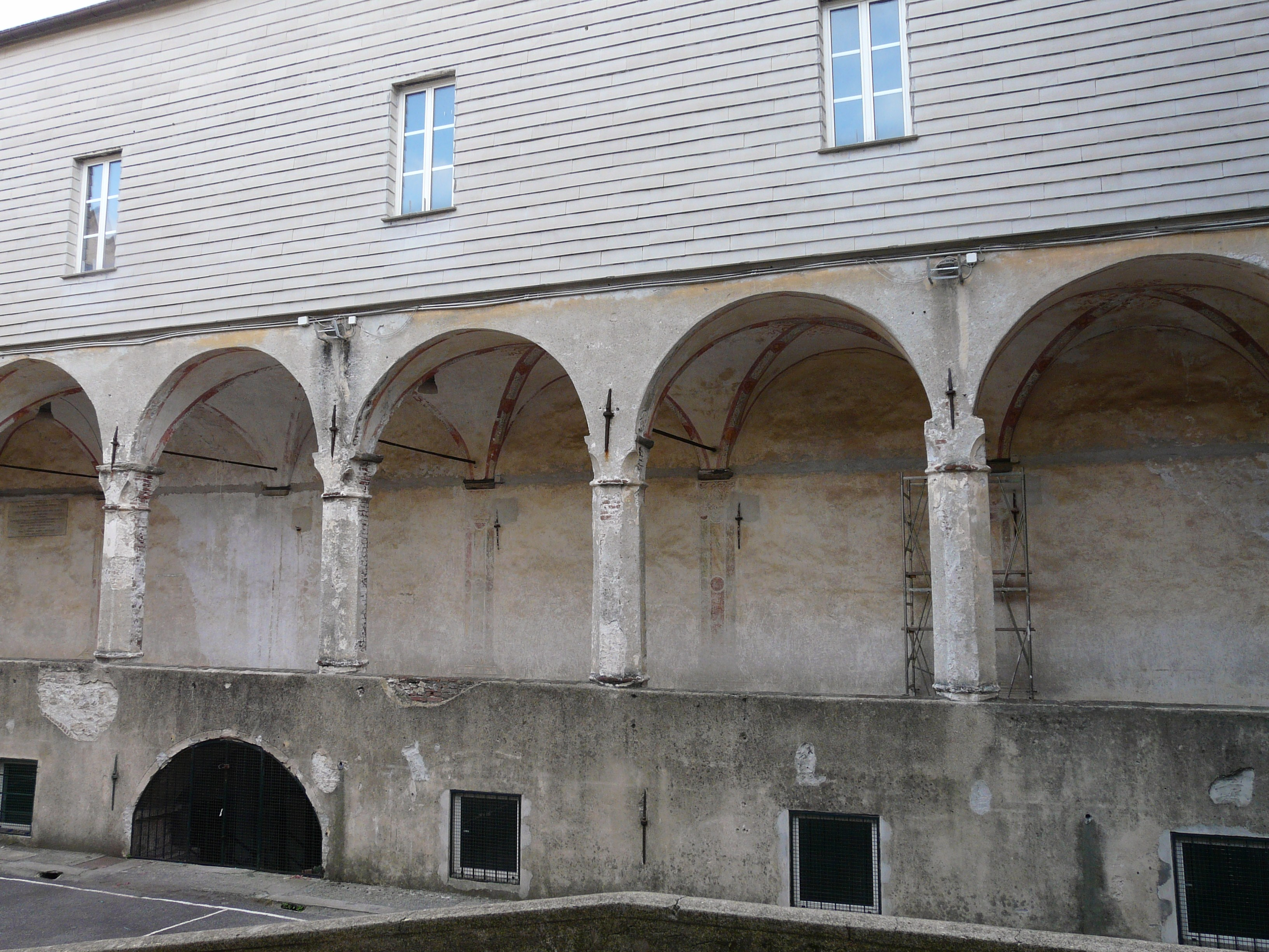 Chiostro interno della chiesa di San Gerolamo, Quarto dei Mille, Genova, Liguria, Italia